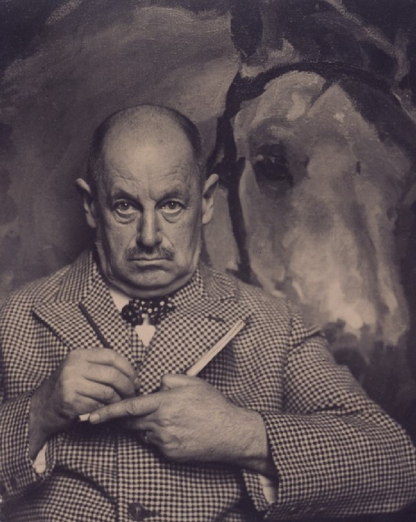 Hugo Erfurth - Portrait des Malers Max Feldbauer. Bromsilbergelatine, 29 x 23,5 cm